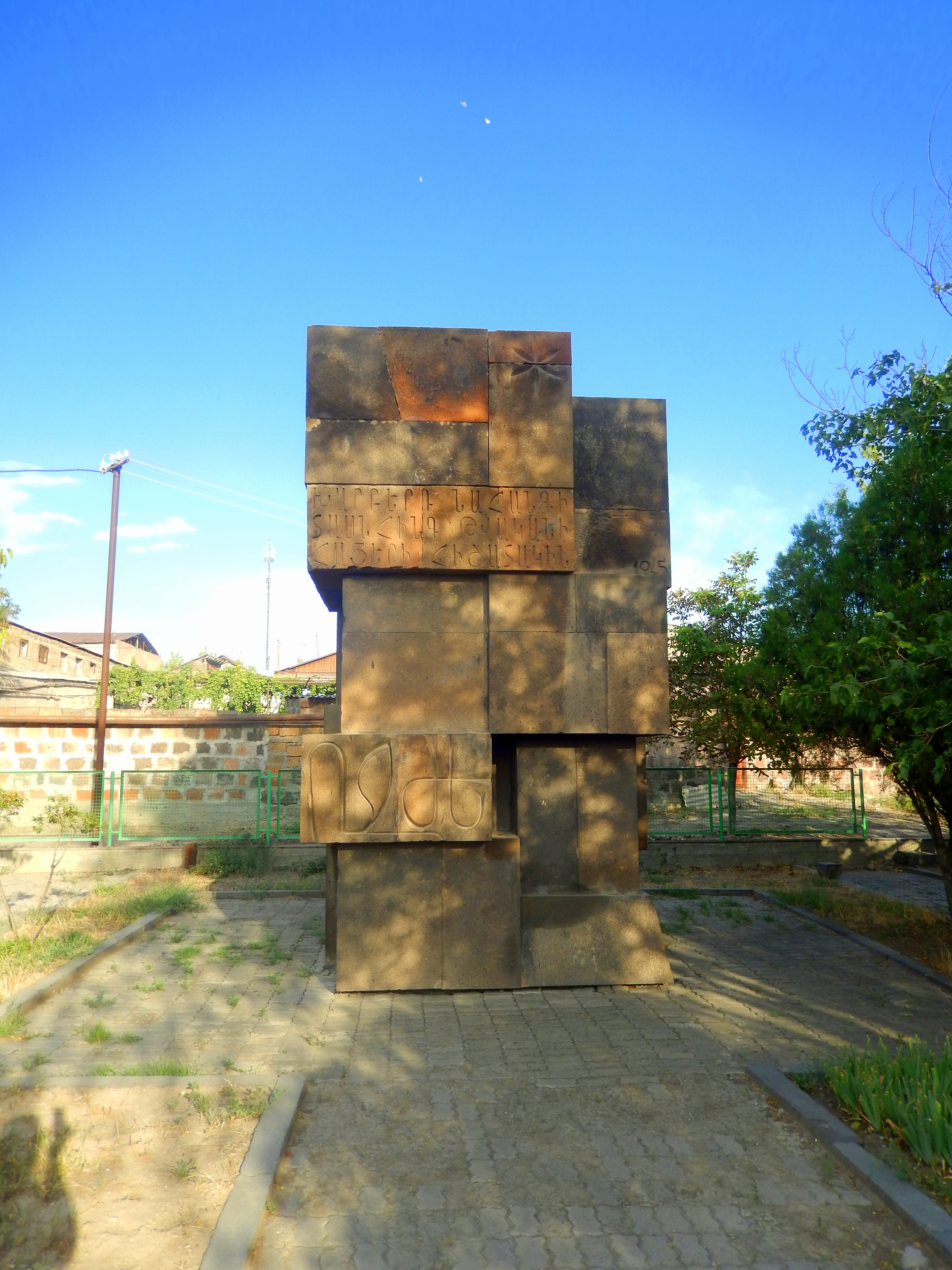 Հուշարձան Մեծ եղերնի զոհ խարբերդցիներին 70/